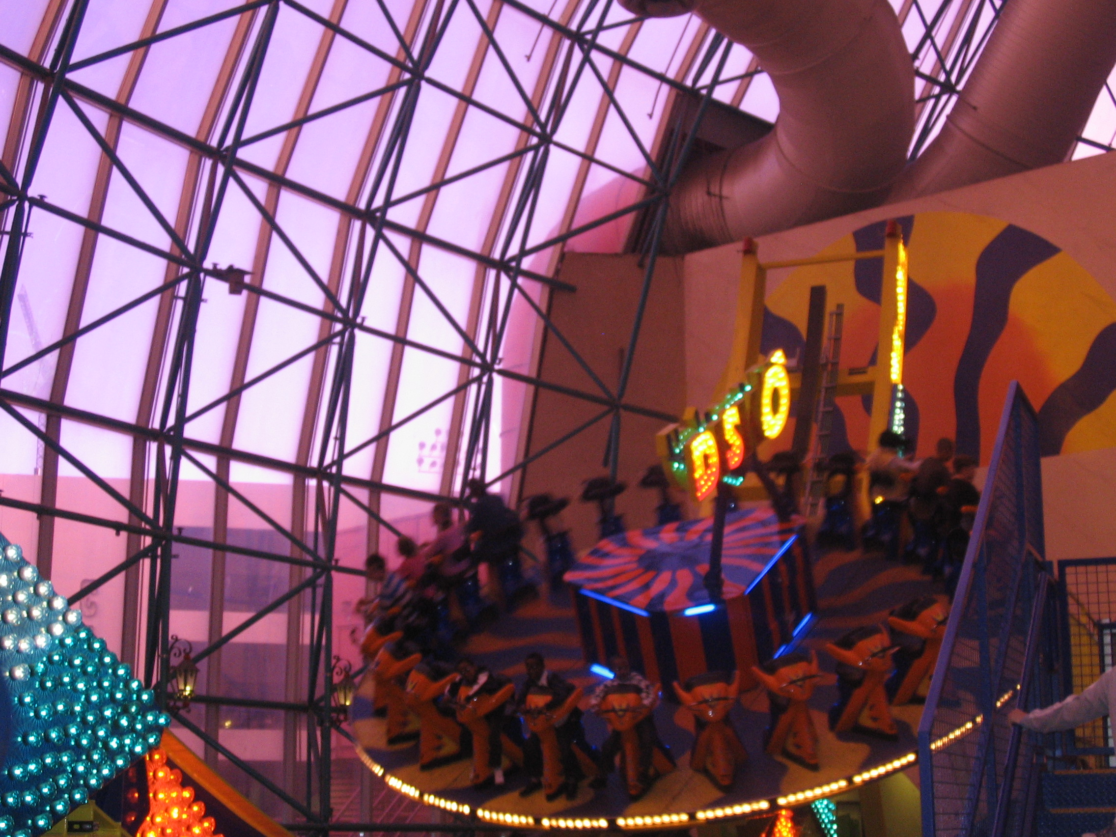 L'attraction Disk'O au parc Adventuredome, dans le Circus Circus